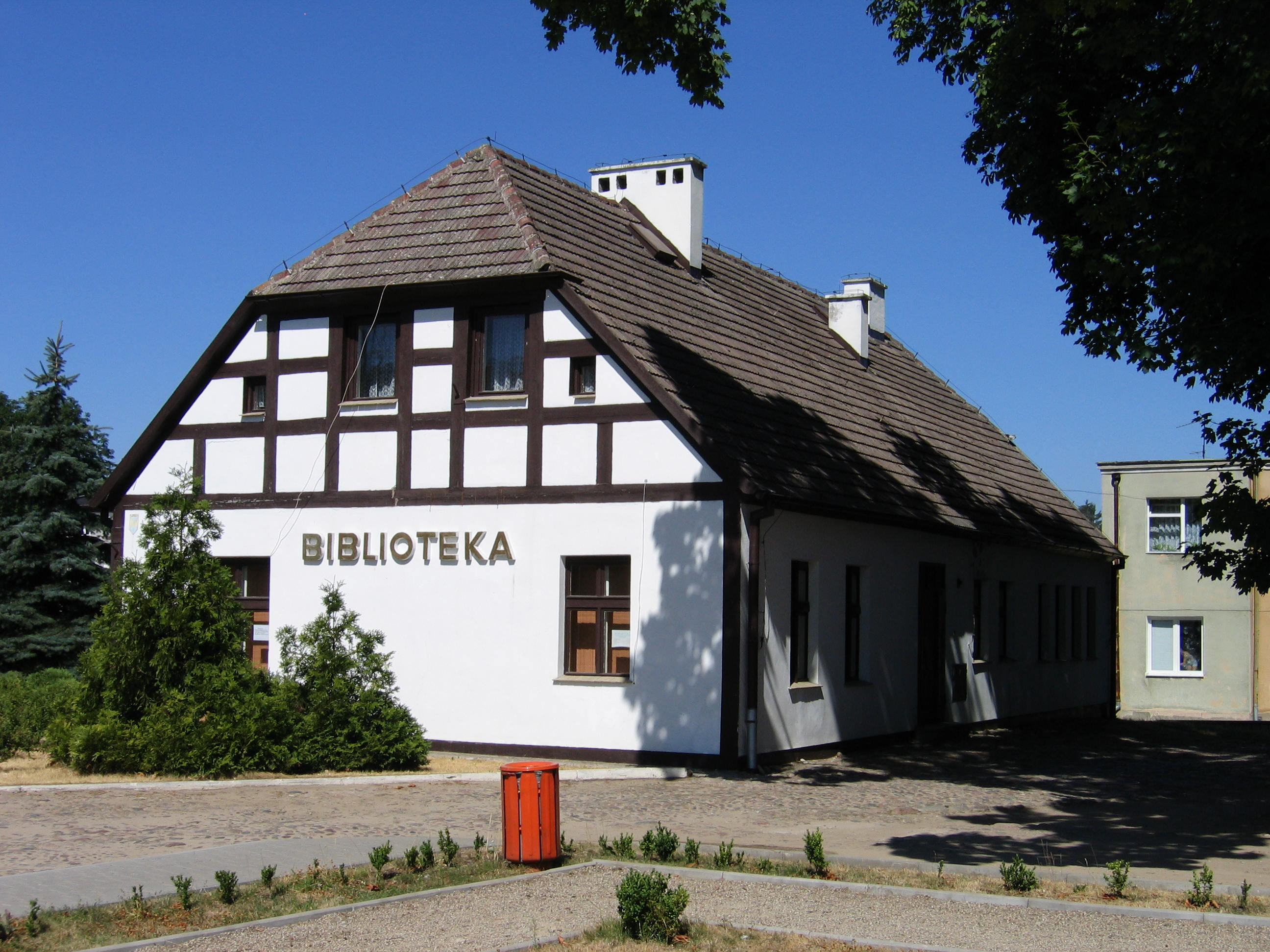 Recz, ul. Ratuszowa 6 - organistówka, obecnie biblioteka